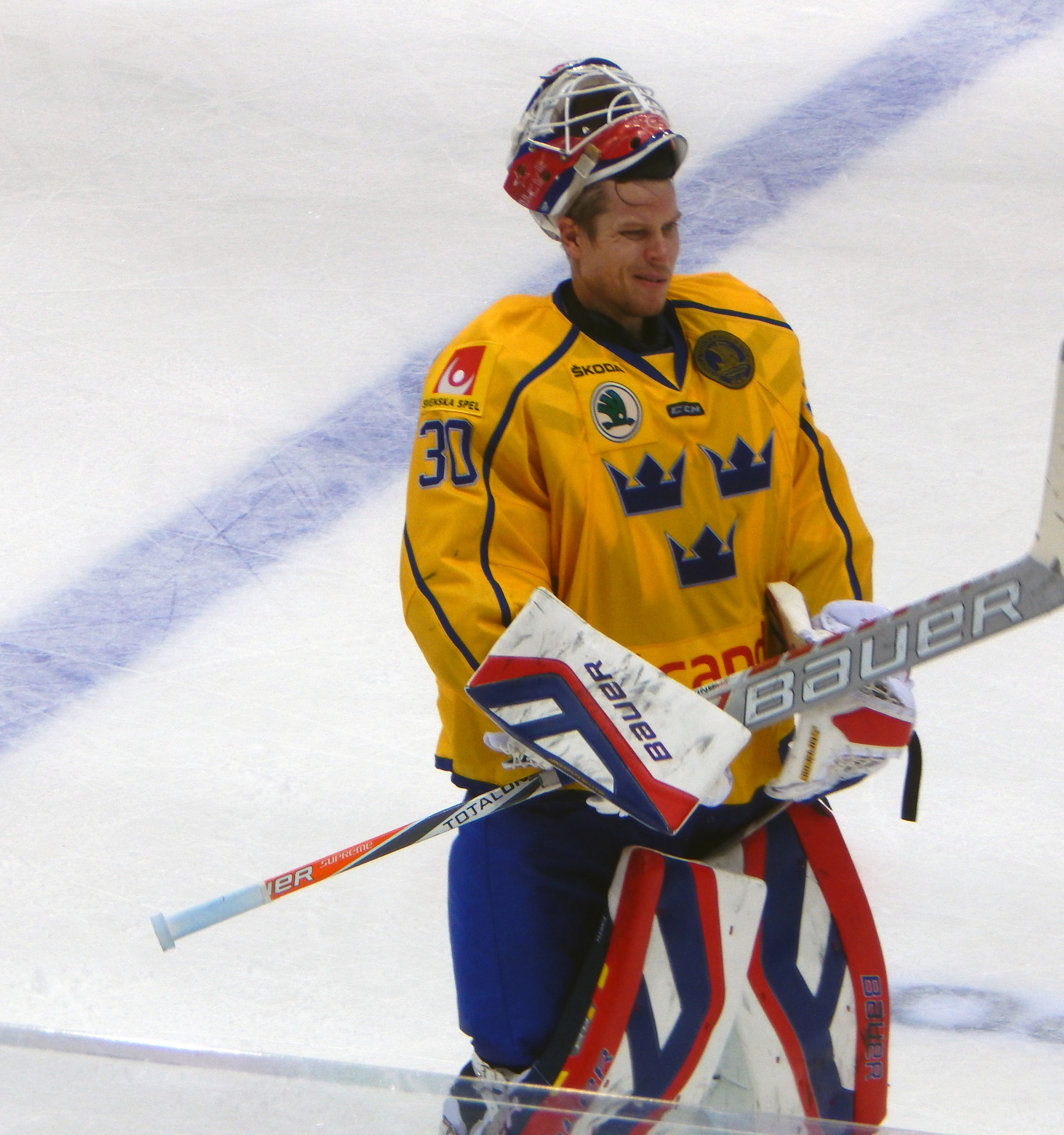 Виктор Фаст на кубке Первого Канала 2015